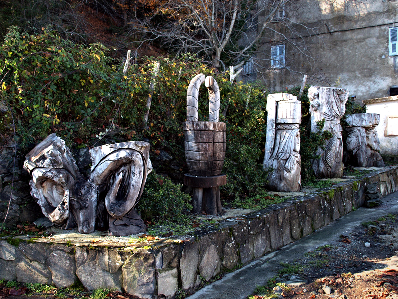 Vezzani (Corse) - Sculptures sur troncs de bois (Vezzani organise chauqe année une Fête du bois et de la forêt).